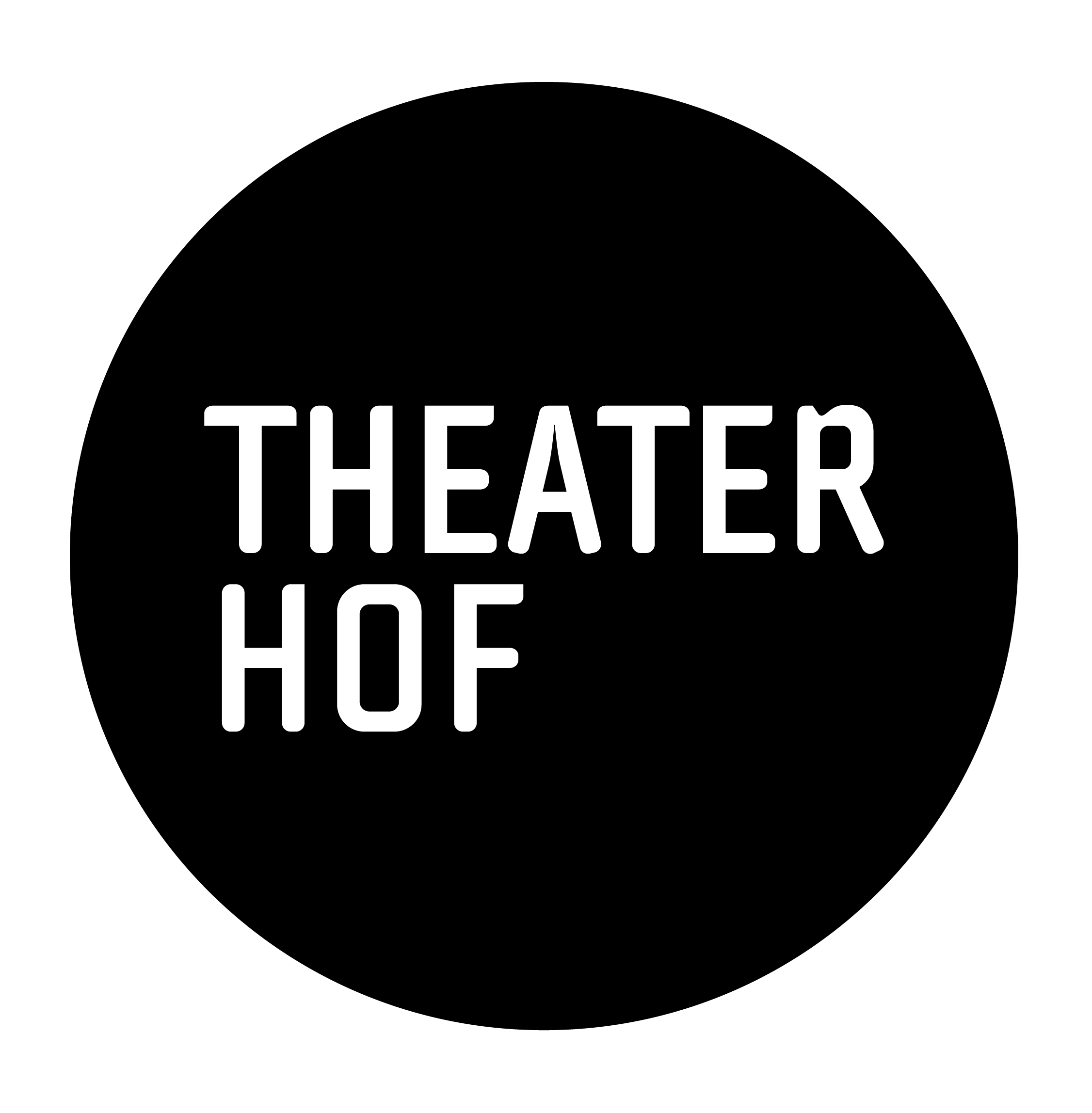 Logo